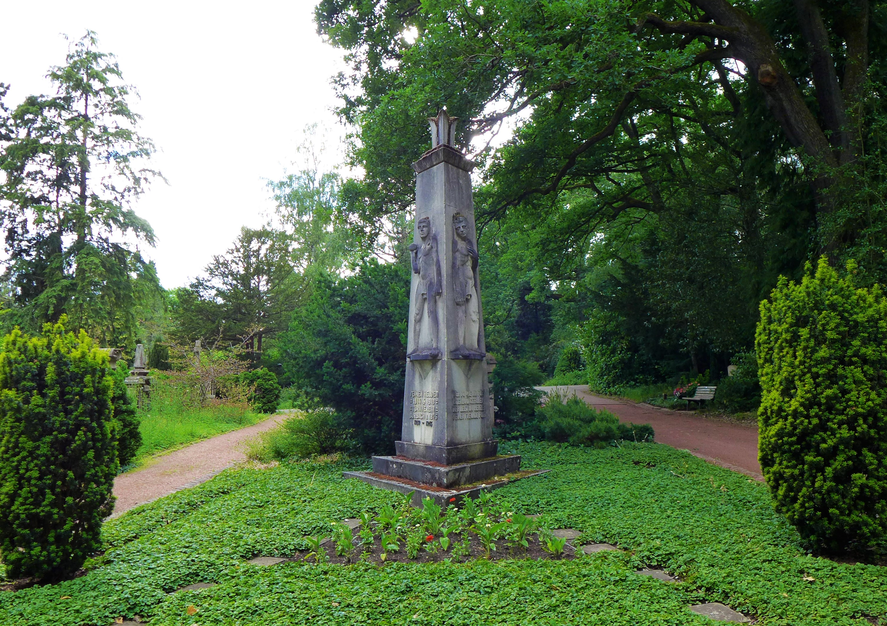 Waldfriedhof Burbach (Saarbrücken), Turnerdenkmal